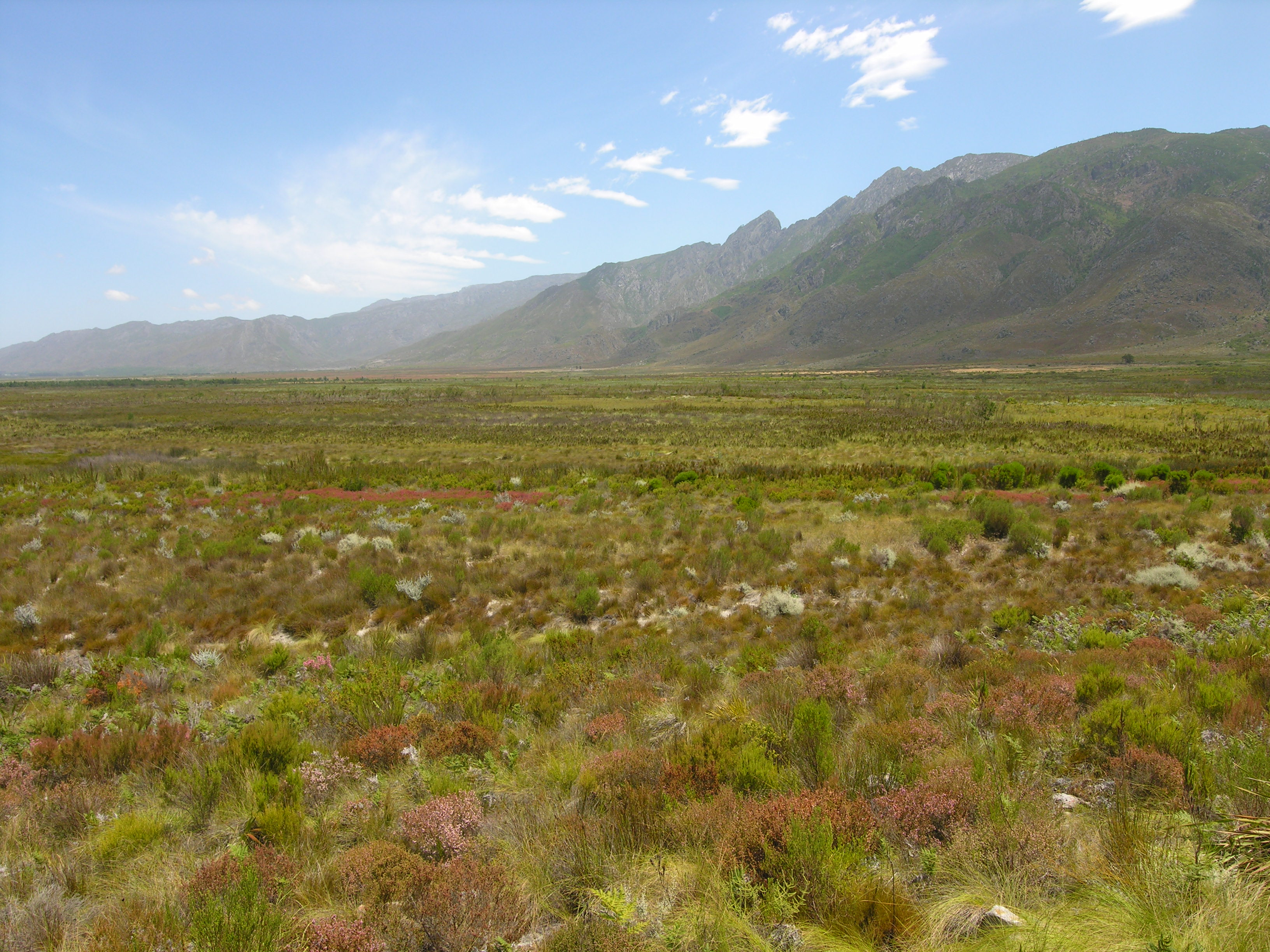 Fynbos near Franschhoek